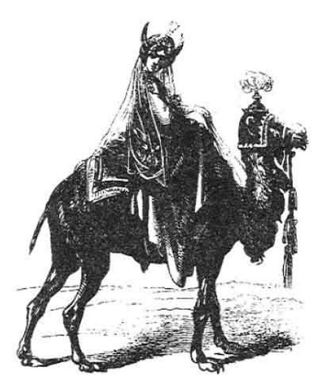 Gremory, from Dictionnaire Infernal, 6th edition. The Fifty-sixth Spirit is Gremory, or Gamori. He is a Duke Strong and Powerful, and appeareth in the Form of a Beautiful woman, with a Duchess's Crown tied about her waist, and riding on a Great Camel. His Office is to tell of all things Past, Present, and to Come; and of Treasures Hid, and what they lie in; and to procure the Love of Women both Young and Old. He governeth 26 Legions of Spirits